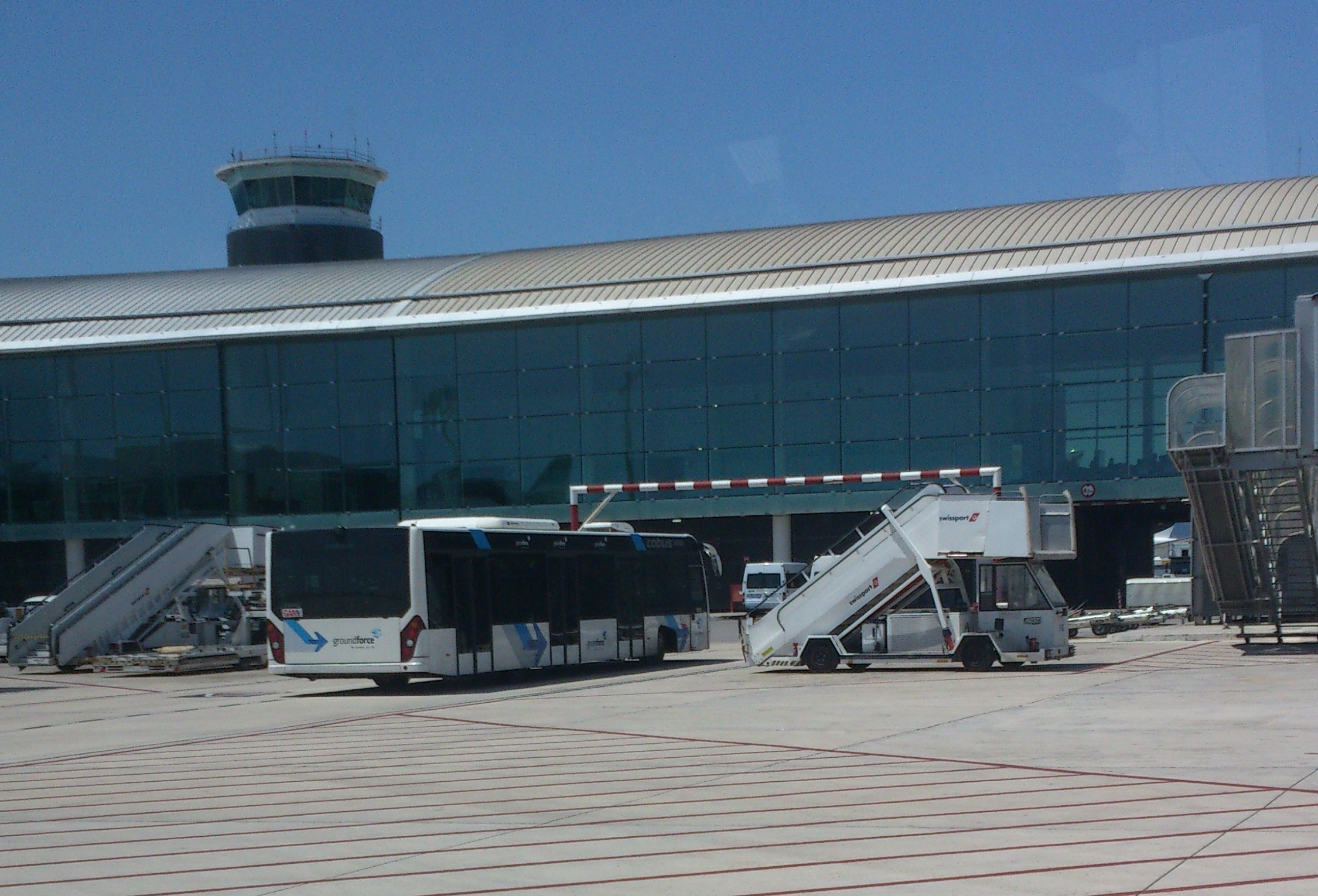 Barcelona Airport